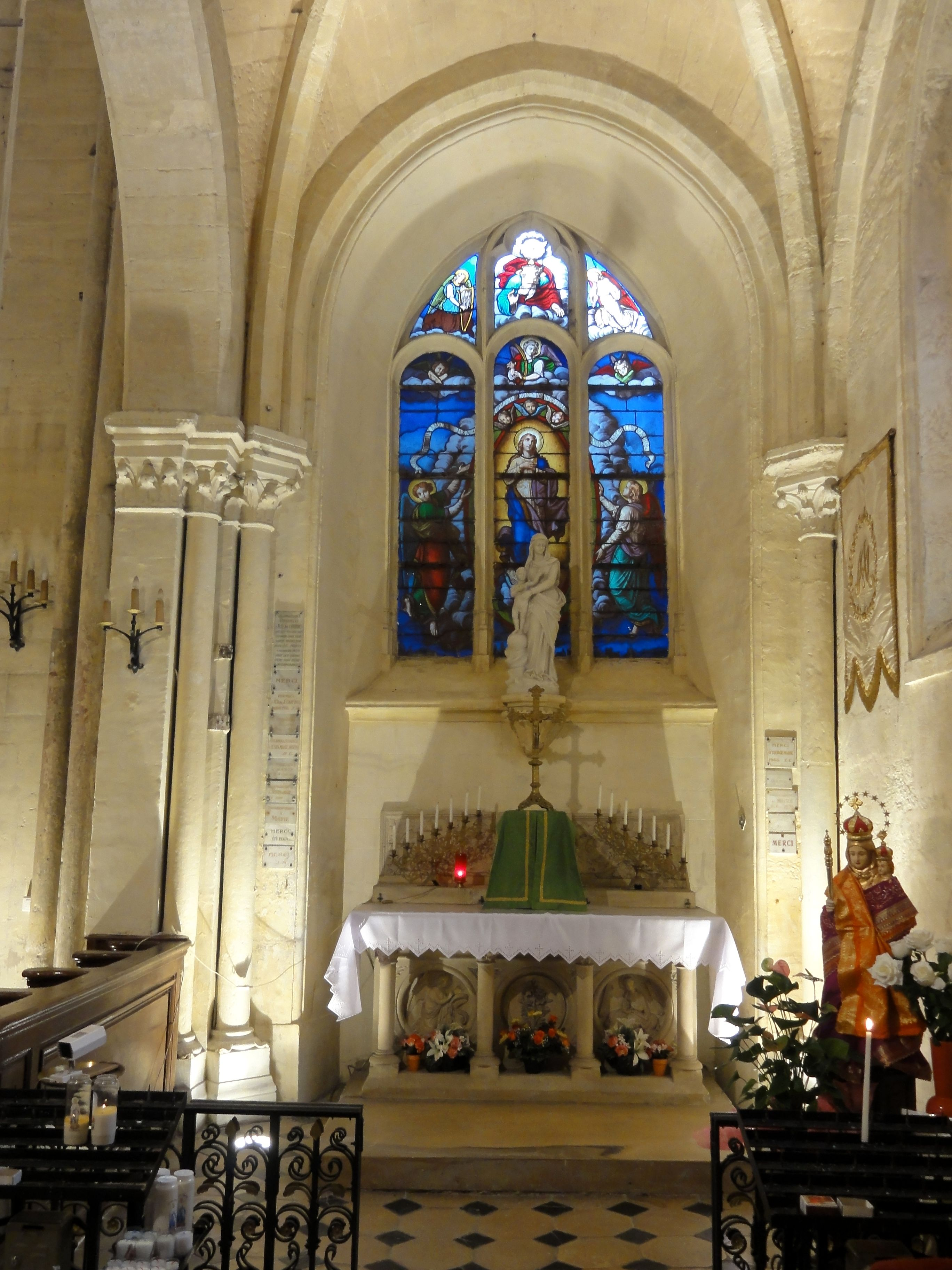 Bas-sud, chevet (chapelle de la Vierge).